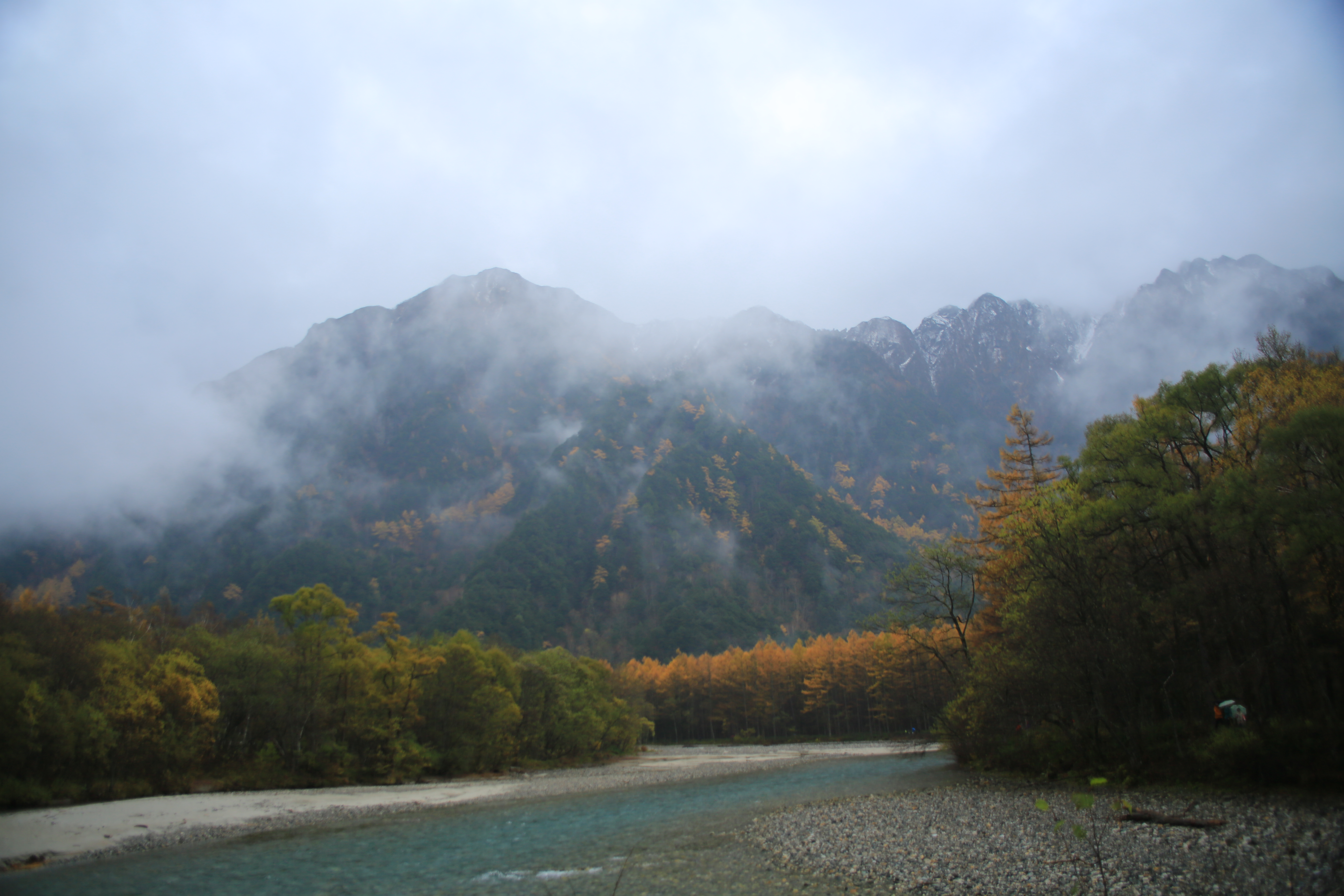 20171028_Kamikochi_1491